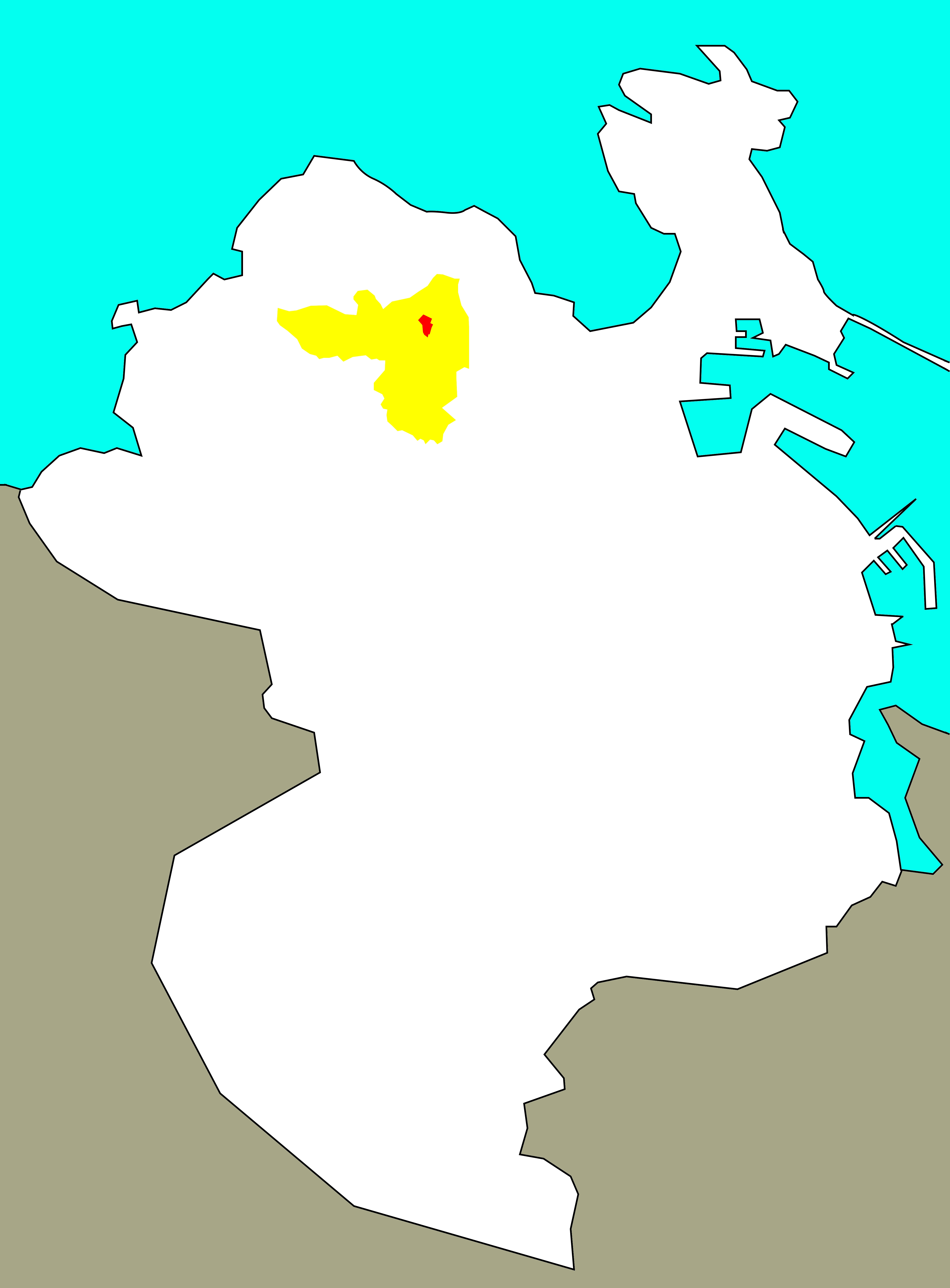 Situación de Cal de Moreiras no "barrio-territorio" de San Pedro de Visma.[1]